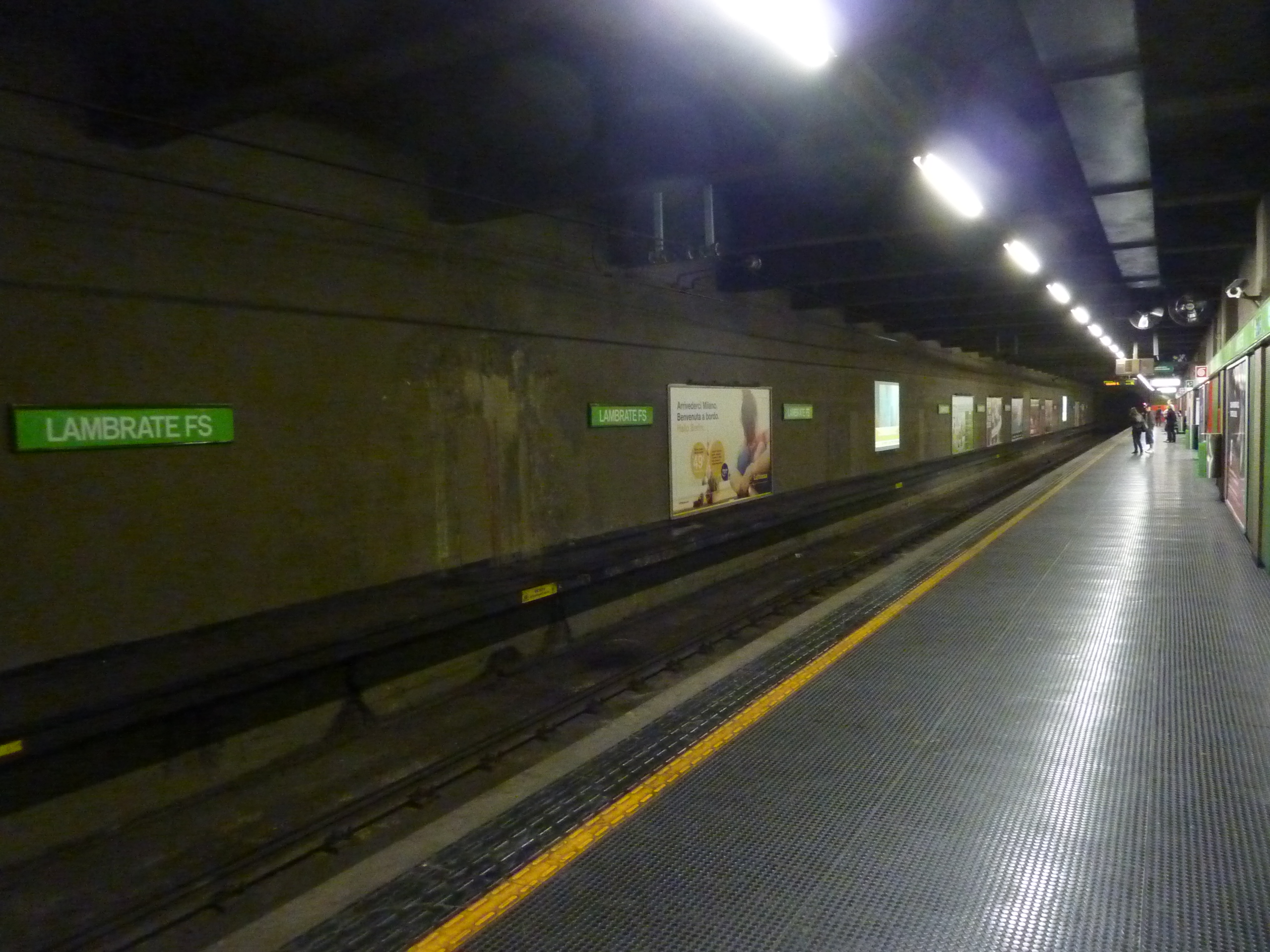 stazione lambrate della metropolitana di milano linea m2